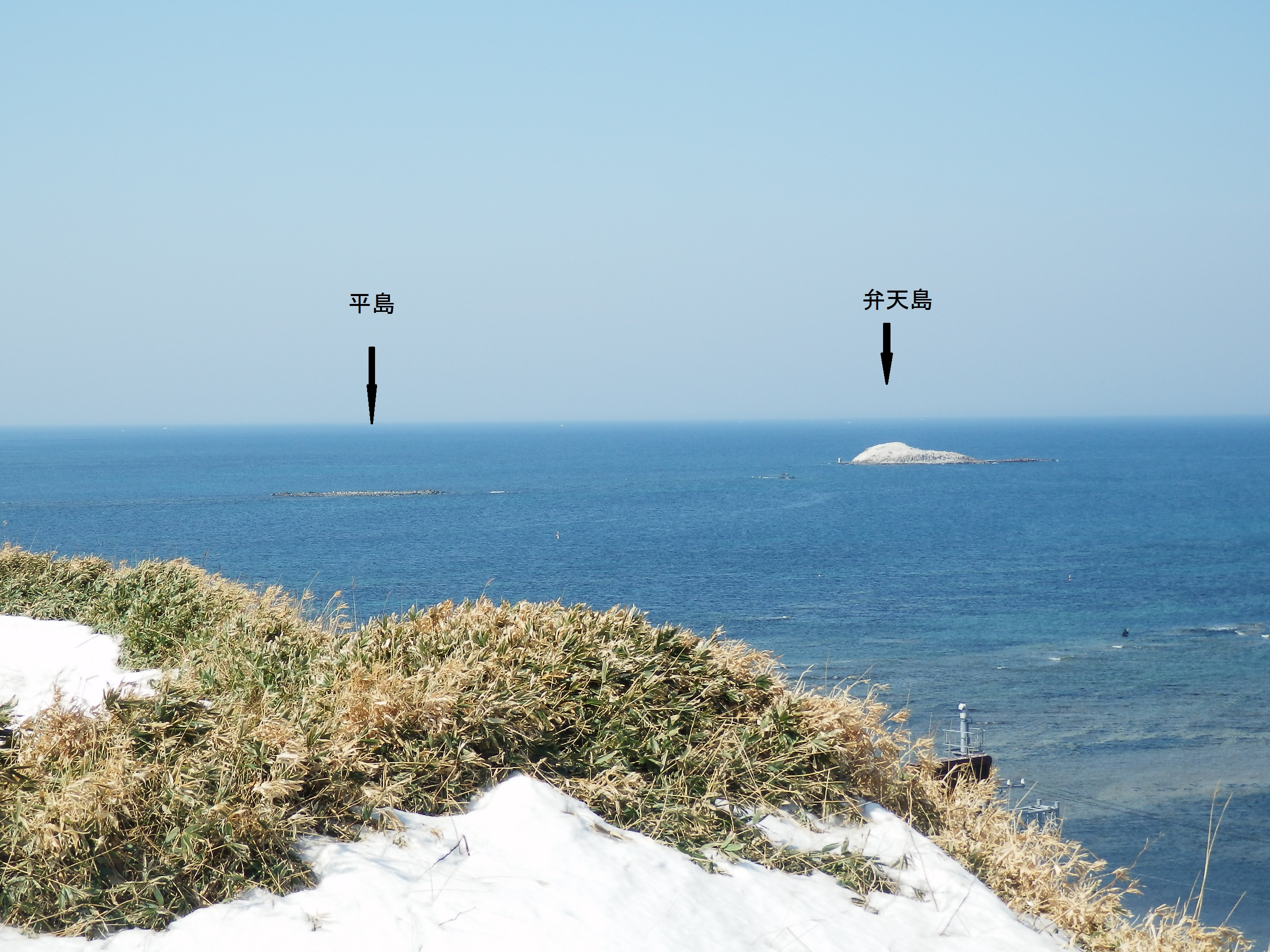 宗谷岬の北西に浮かぶ弁天島と平島